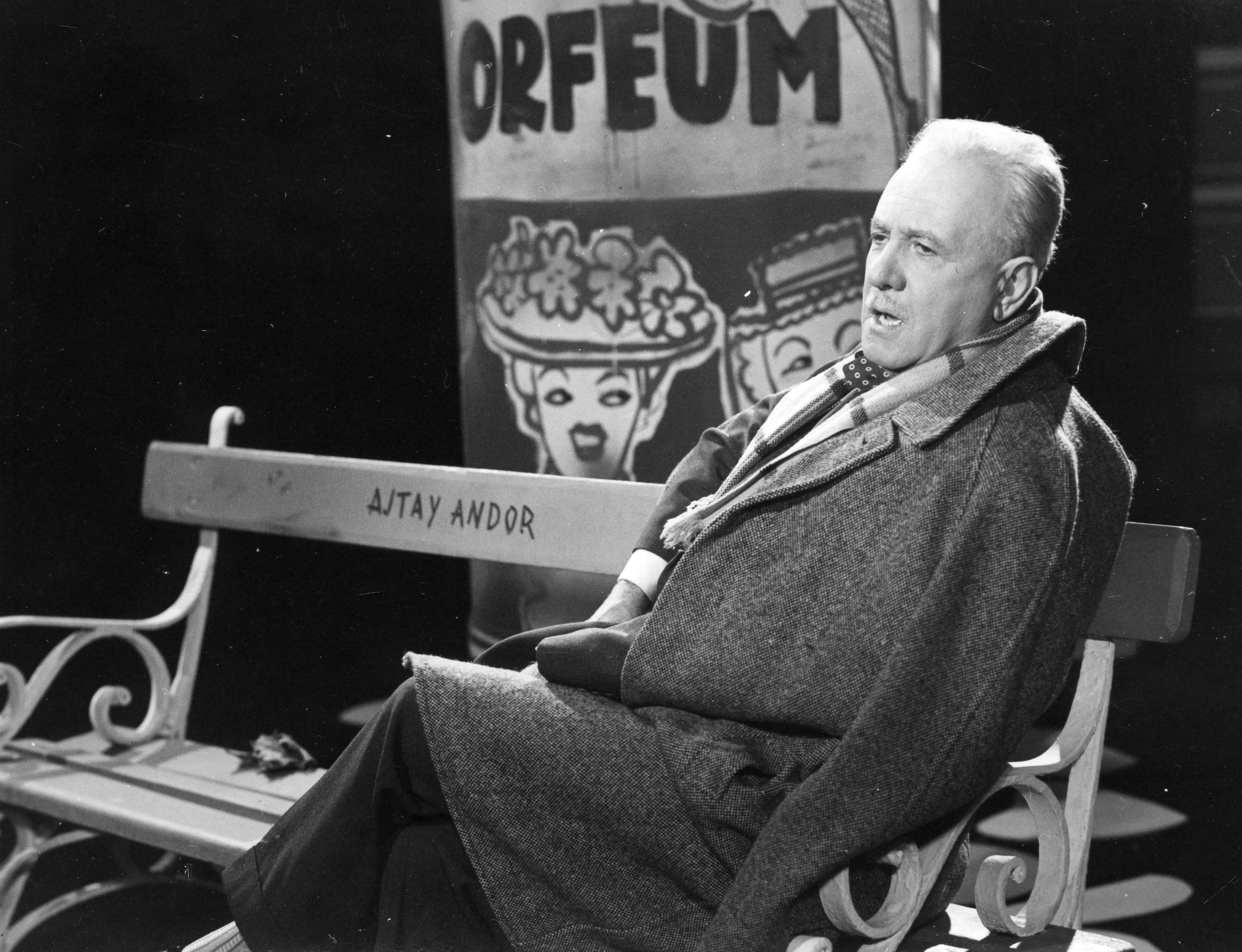 Ajtay Andor, sz. Ajtay Kovács Andor (Fogaras, 1903. július 25. – Budapest, 1975. május 9.) Kossuth-díjas magyar színész, rendező.